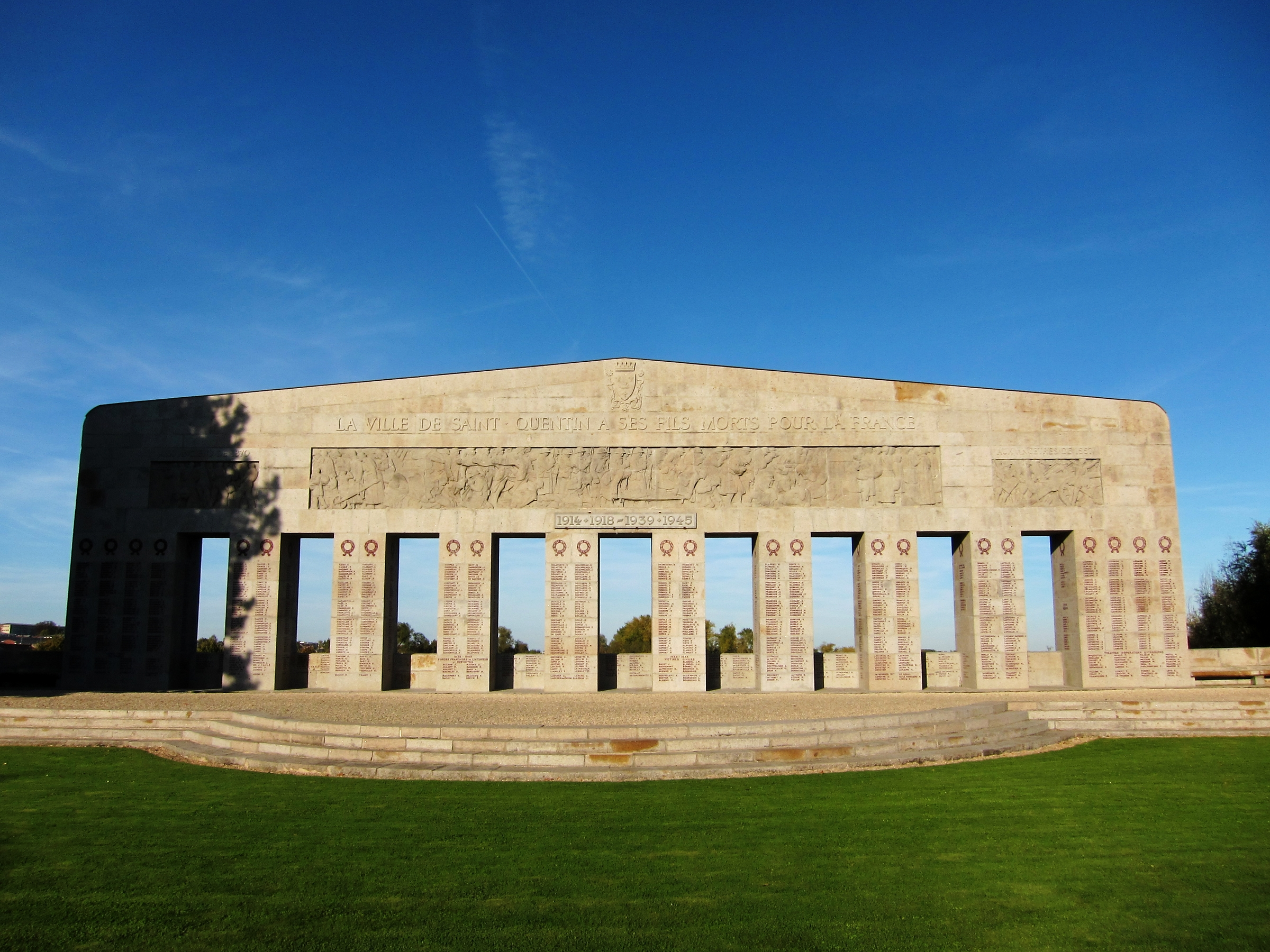 Le monument aux morts de Saint-Quentin (Aisne).